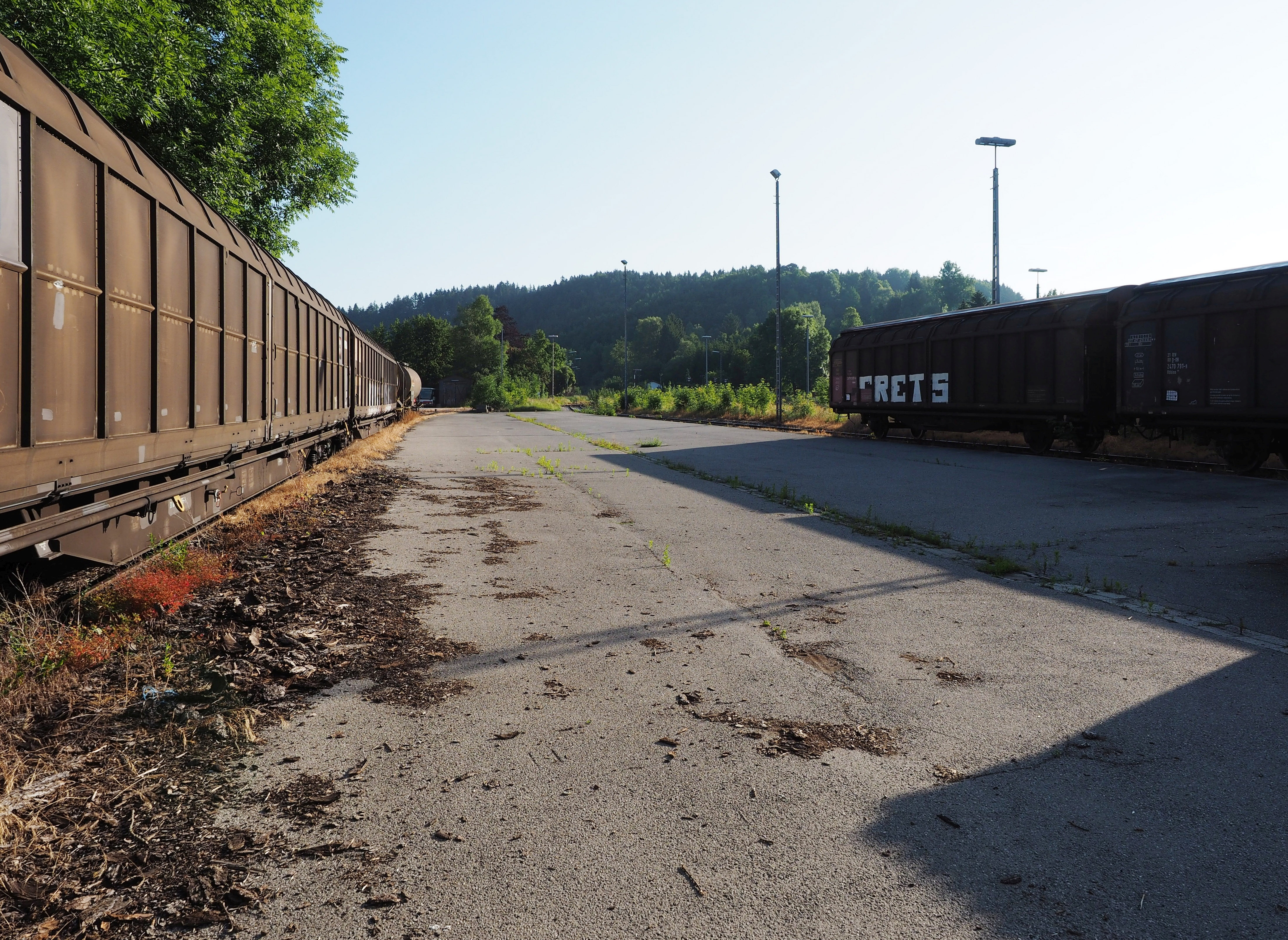 Bahnhof Schongau, Gütergleise (Stumpfgleise) nördlich des Empfangsgebäudes, Blickrichtung Norden auf der Ladestraße zwischen den Gleisen. Auffälliger Schattenwurf bei frühmorgendlichem flachen Sonnenstand.